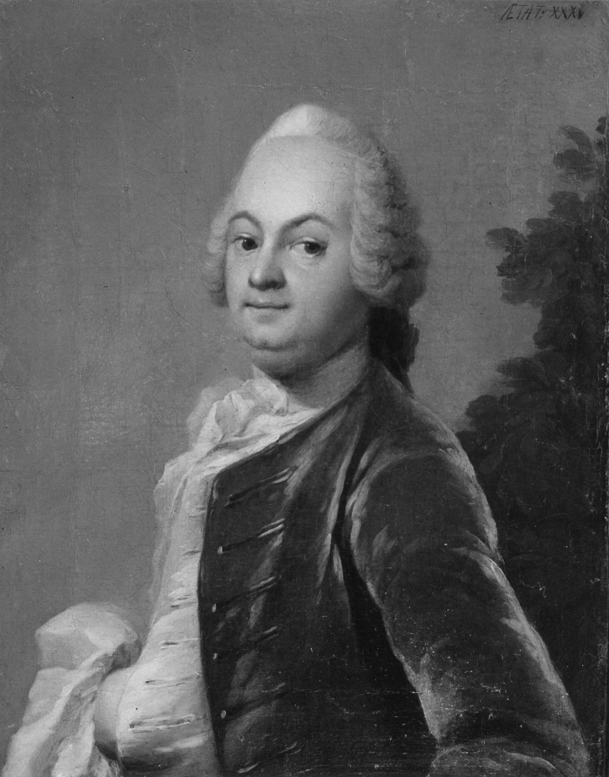 Stiftsamtmann Hans Hagerup Gyldenpalm, oljemaleri av Carl Gustav Pilo, repro Jan H. Reimers, Norsk portrettarkiv, Riksantikvaren